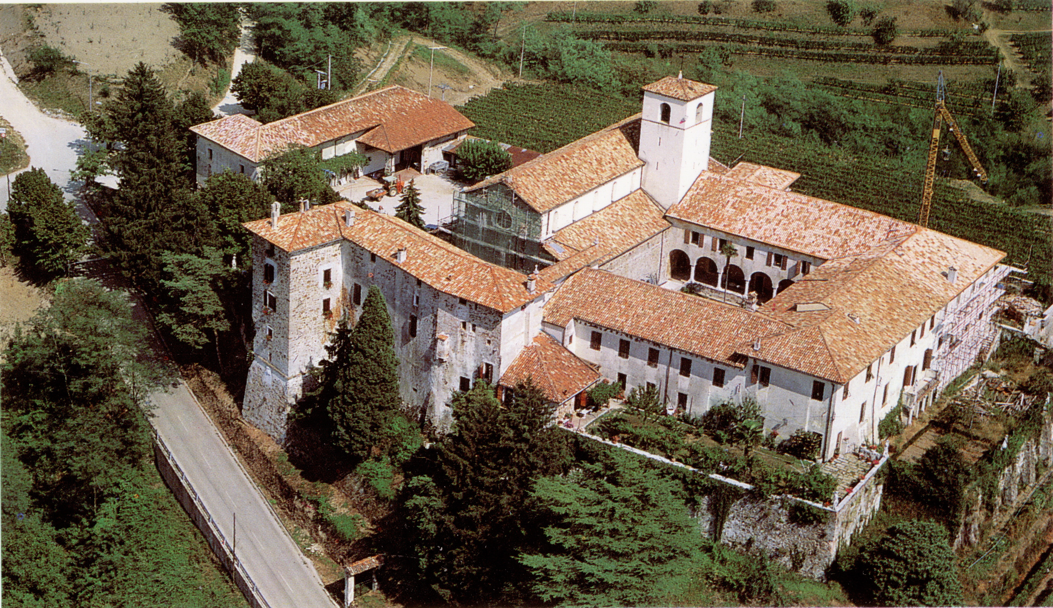 Abbazia di Rosazzo - Panorama